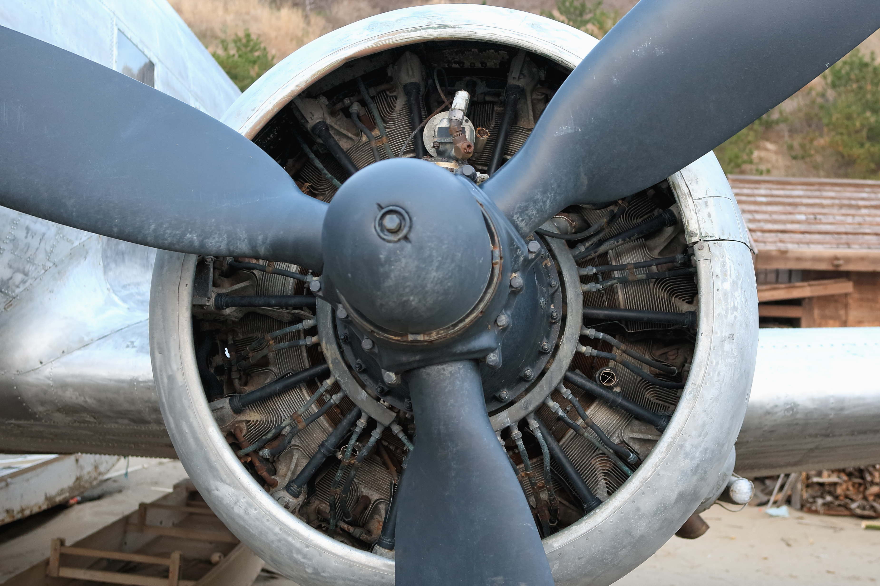 映画「飛べ!ダコタ」撮影のために、新潟県佐渡市（旧羽茂町）佐渡市小木堂釜の素浜海岸に置かれた、元USAF DOUGLAS AC-47D C-47B-1-DK 43-48501 同映画のモデルになったイギリス空軍 DOUGLAS DC-3 C-47A-50DL “SISTER ANN” C/N10028 FL510のレプリカ塗装になっている